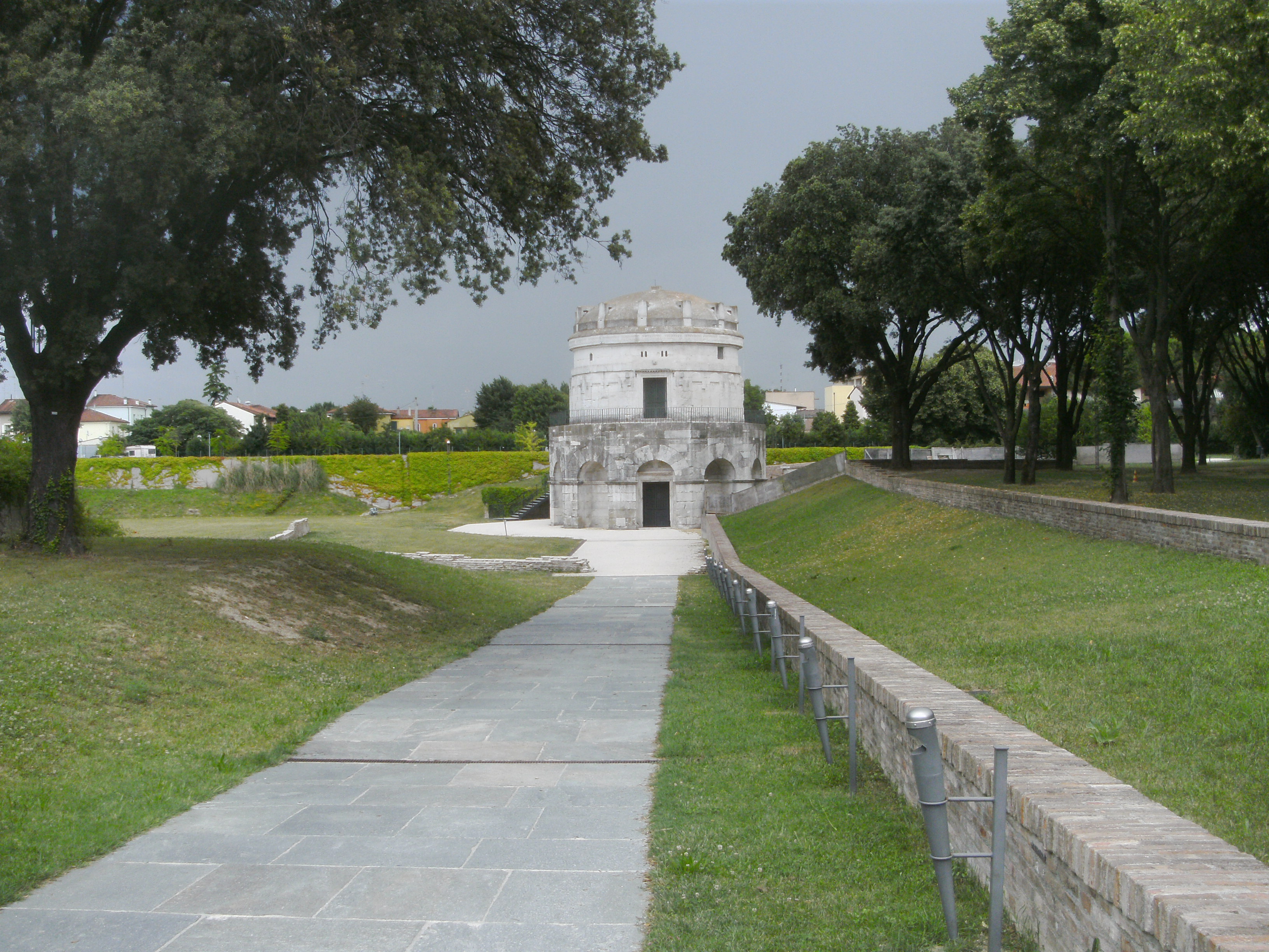 Ravenna, Grabmal des Theoderich im Theoderich-Park (Parco di Teodorico), Panorama-Ansicht